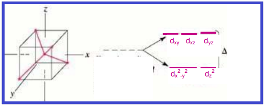 Koordinazio konposatu tetraedrikoen d orbitalenenergia mailak